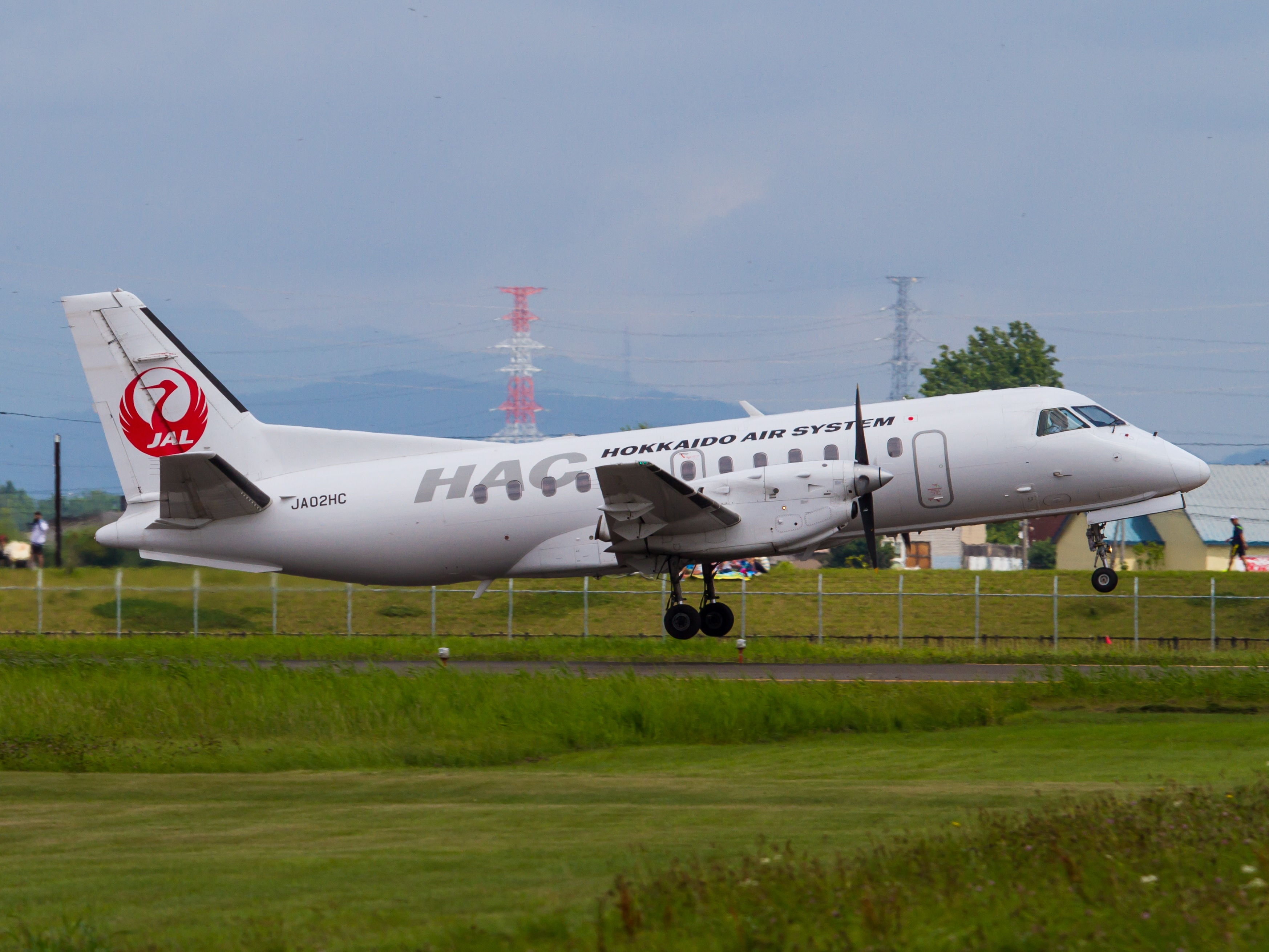 北海道エアシステムのSAAB340B。丘珠空港で撮影